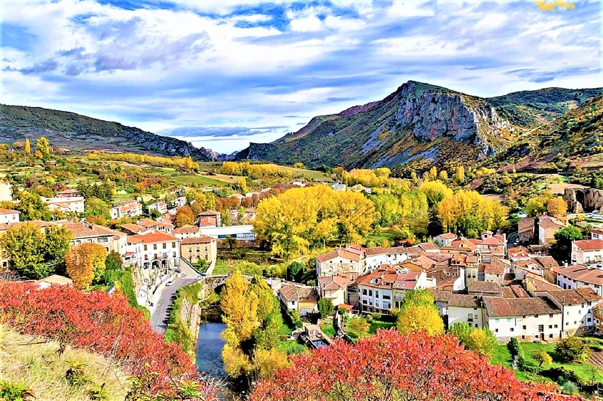 Vistas hermosas de Torrecilla en Cameros